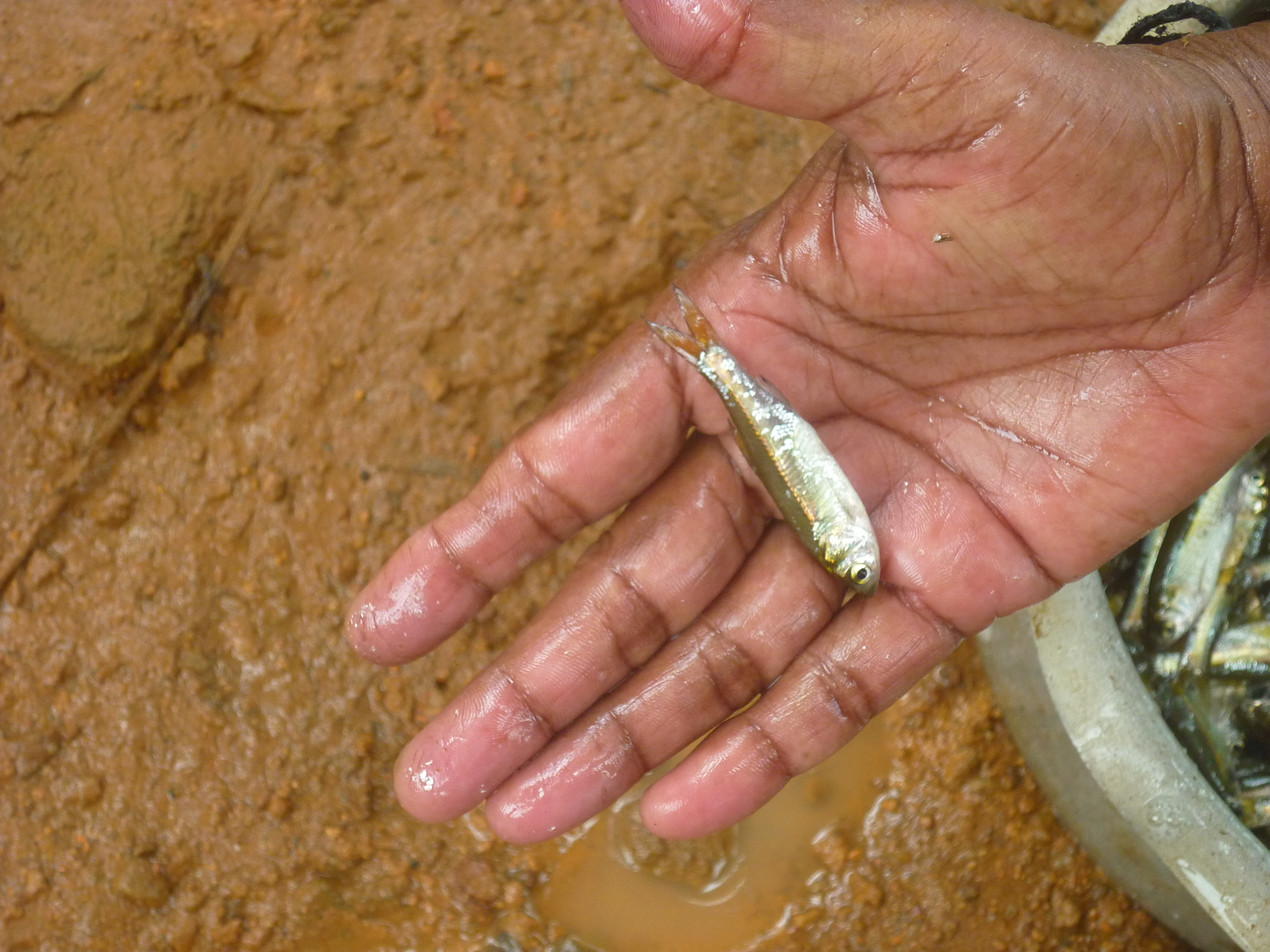 ചെറിയ മത്സ്യങ്ങളുടെ ഗണത്തിൽ പെടുന്ന ഒരിനം